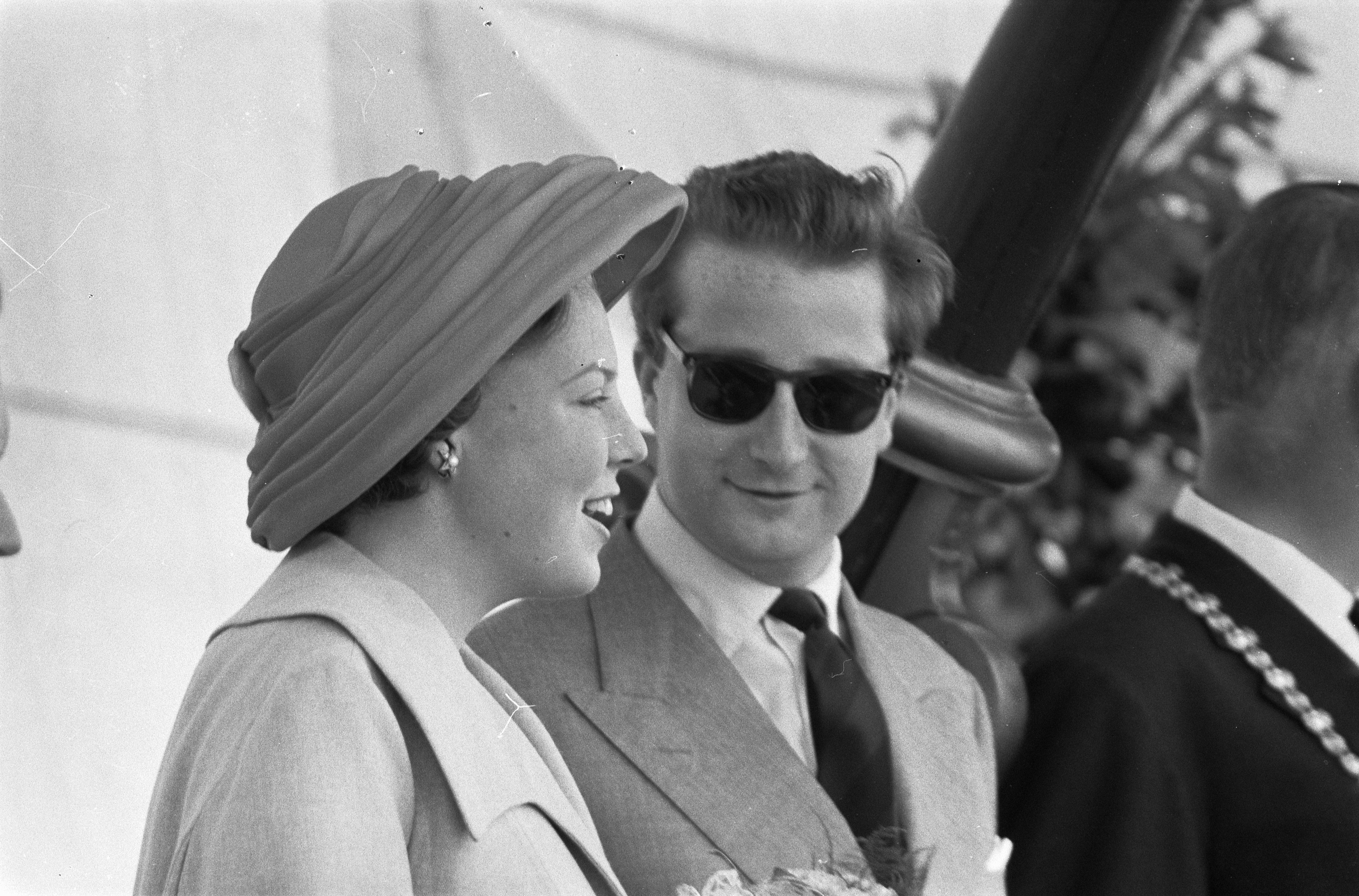 Collectie / Archief : Fotocollectie Anefo Reportage / Serie : [ onbekend ] Beschrijving : Nationale manifestatie van de Mobiele Brigade in Utrech aankomst van Prinses Beatrix Datum : 7 juni 1960 Locatie : Utrecht Trefwoorden : MANIFESTATIES, aankomsten Persoonsnaam : Beatrix, prinses Instellingsnaam : Mobiele Brigade Fotograaf : Pot, Harry / Anefo Auteursrechthebbende : Nationaal Archief Materiaalsoort : Negatief (zwart/wit) Nummer archiefinventaris : bekijk toegang 2.24.01.05 Bestanddeelnummer : 911-3190